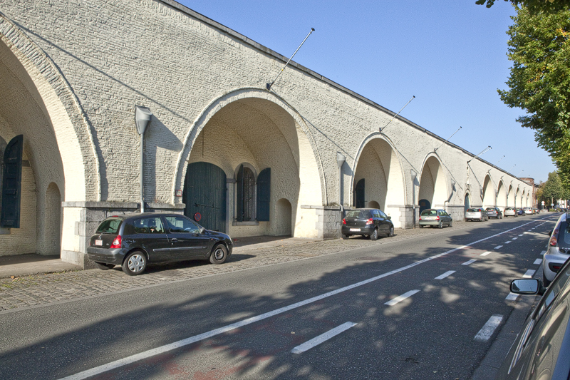 Les Casemates, vestiges des fortifications hollandaises, à la place Nervienne à Mons.